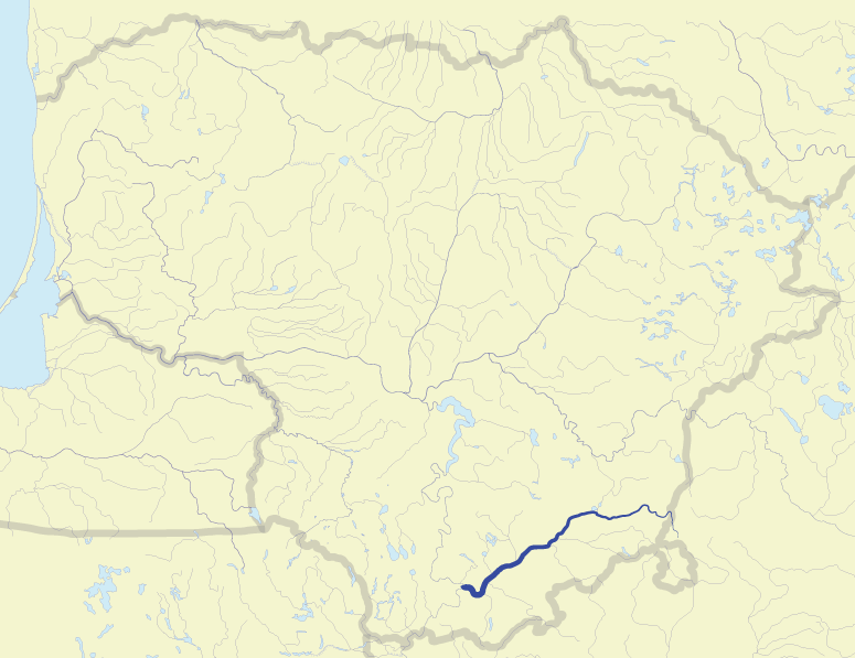 River Merkys